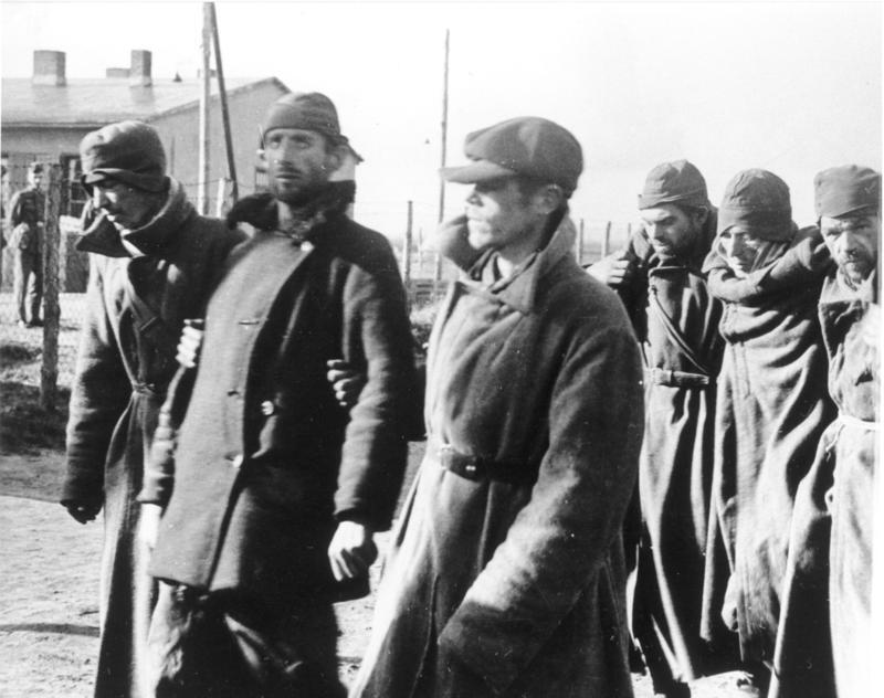 Kriegsgefangenenlager Sandbostel 1941 - 1943, Sterbende Russen "ein alltägliches Bild"